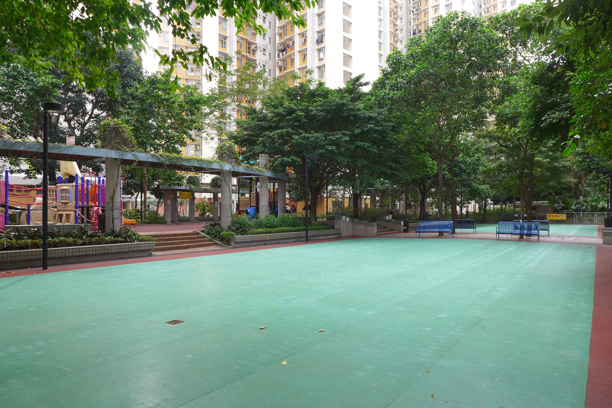 Yu Chui Court open space